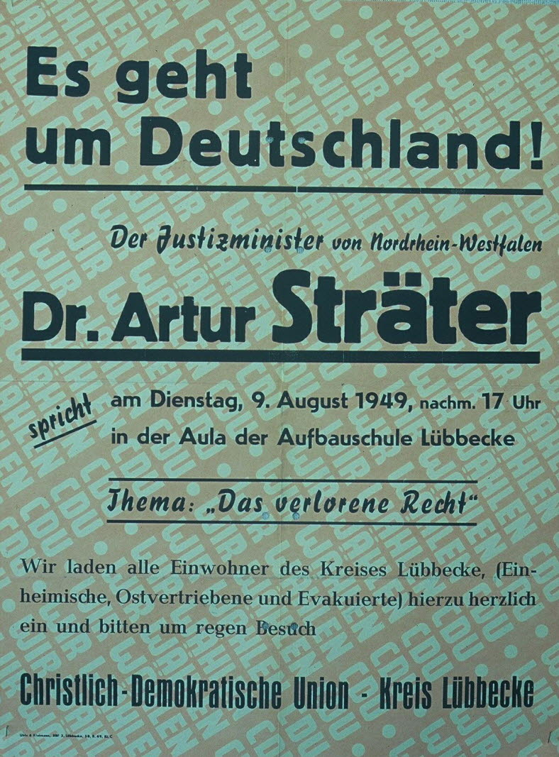 Ankündigungsplakat einer Veranstaltung mit Artur Sträter, Christlich Demokratische Union Deutschlands